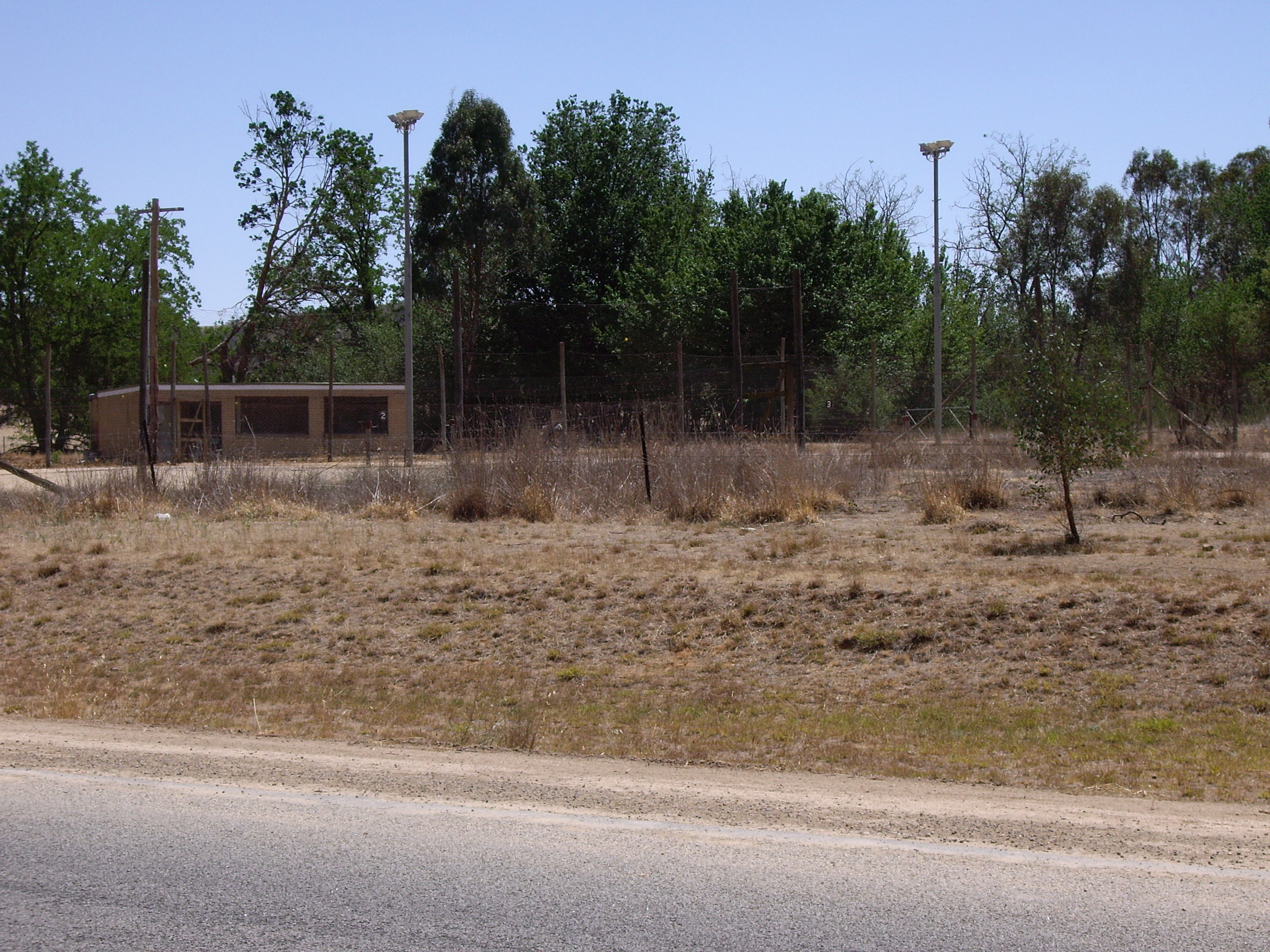 Book Book Tennis Courts